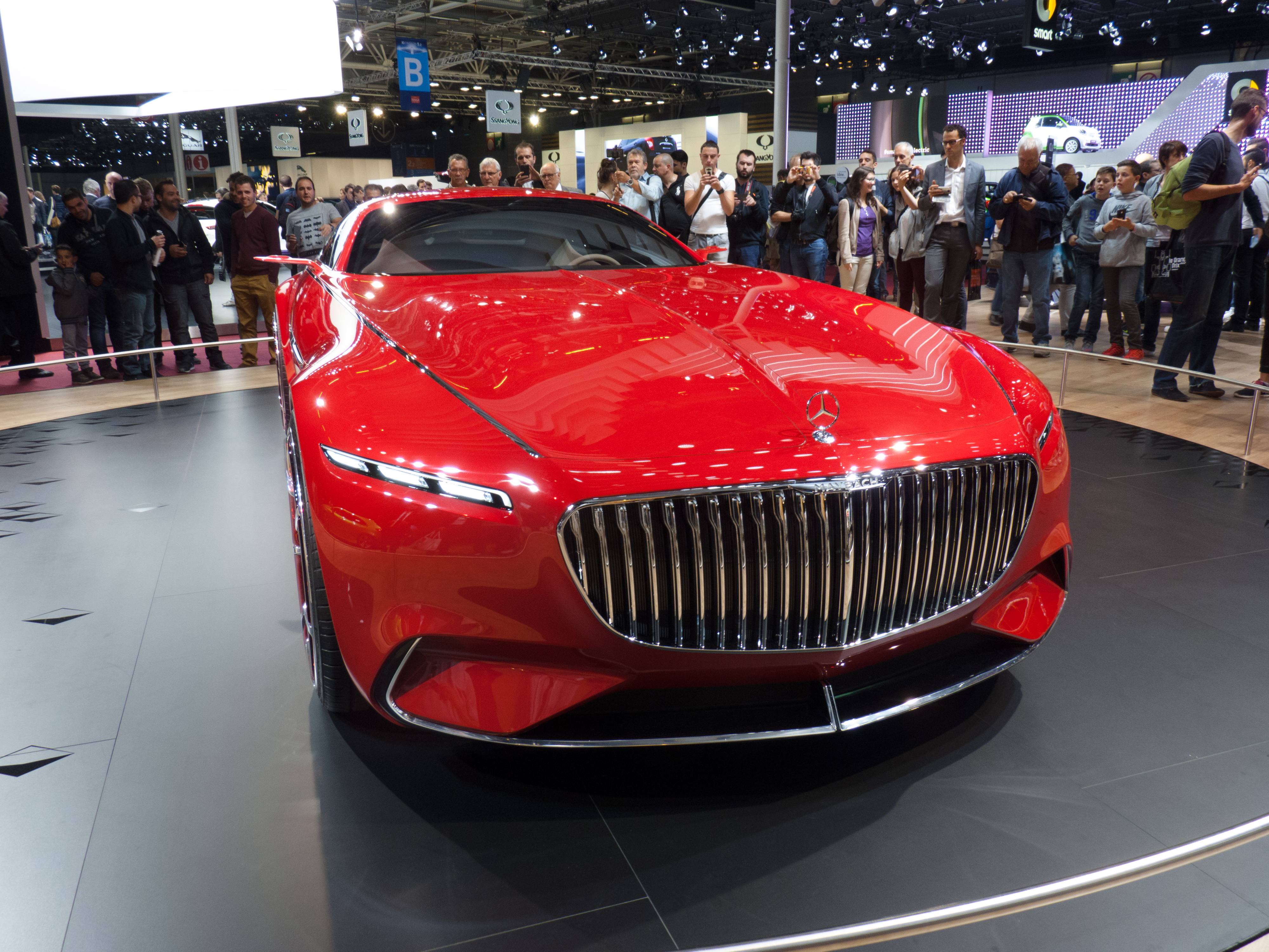 Mercedes-Maybach Vision 6 au Mondial de l'automobile de Paris 2016